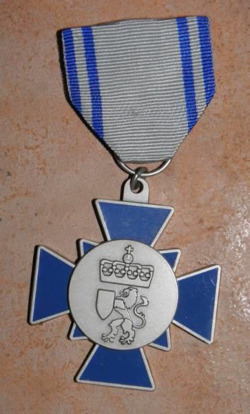 Норвежский Крест Почёта Гражданской обороны